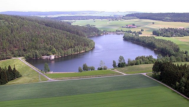 Der Feisnitz-Stausee am Fuße des Kohlberges